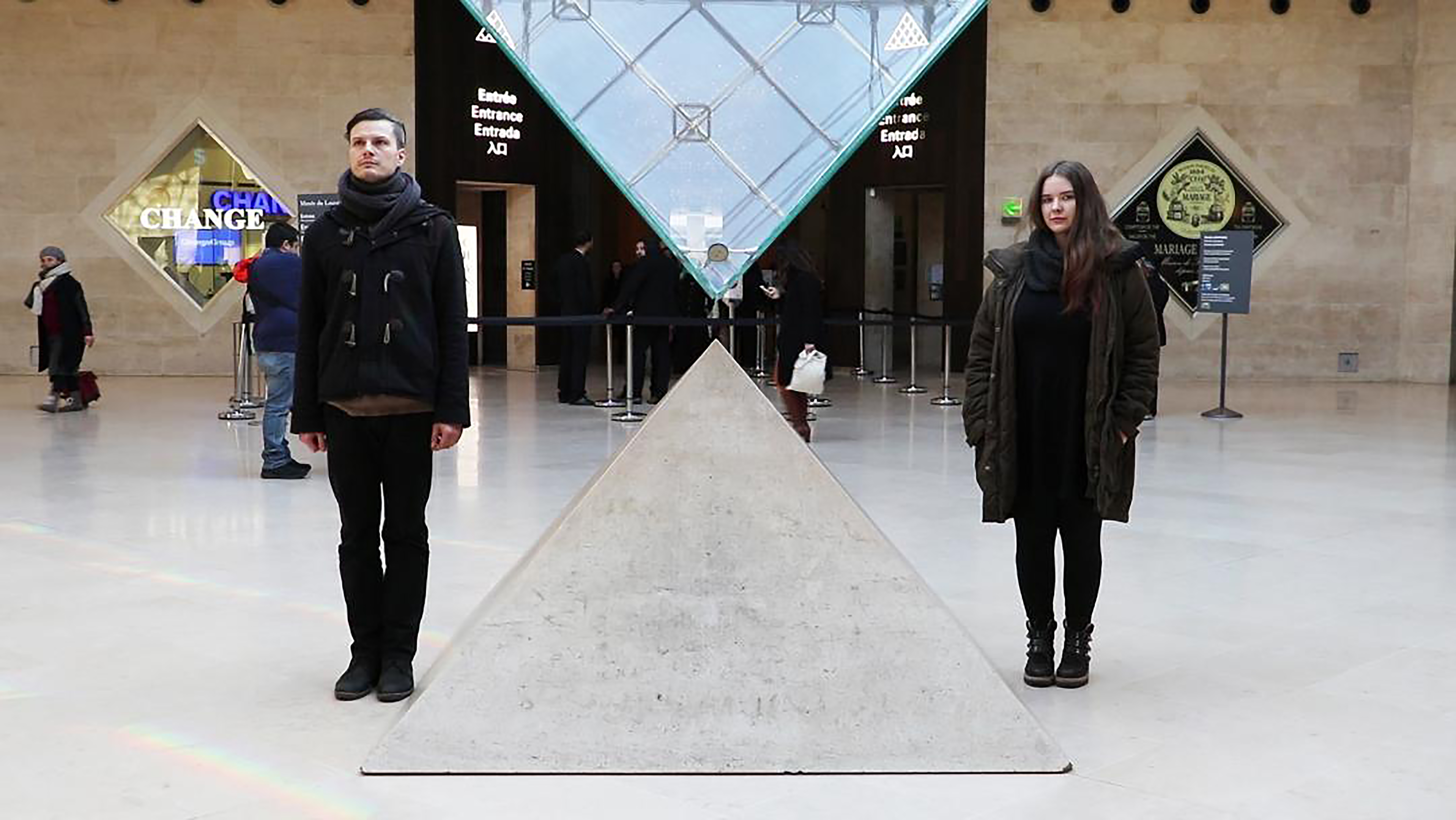 Im Zeitraum 2016 bis 2018 arbeitete Pelz zusammen mit der Künstlerin Johanna Mangold an der Performance-Videoarbeit „Magic Potion“. Der Film besteht aus vierundzwanzig Einzelteilen und hat eine Gesamtlänge von über zwei Stunden. In einer Szene stechen sich die Künstler mit einer Nadel in die Fingerkuppen, um die dabei gewonnen Blutstropfen dem Trank zuzuführen, wobei sie ihre Hände zwischen die Spitzen der inversen Glaspyramide und der sich darunter befindenden kleinen, fünften Pyramide im Eingangssalon des Pariser Kunstmuseums Louvre halten.